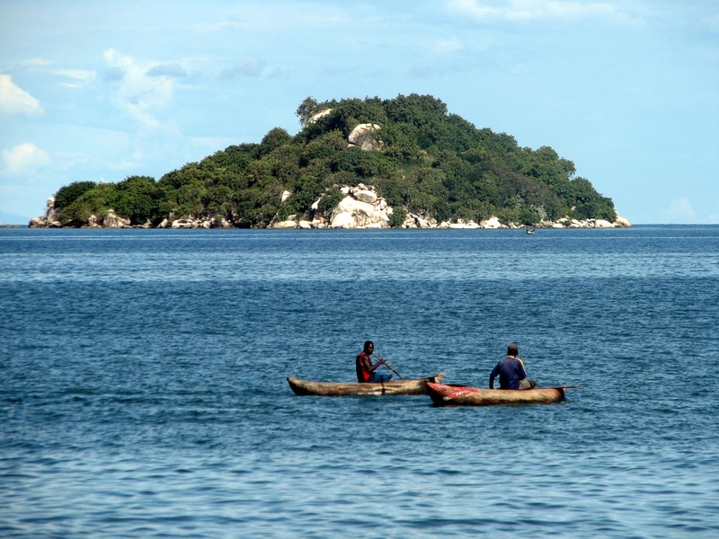 Lake Malawi